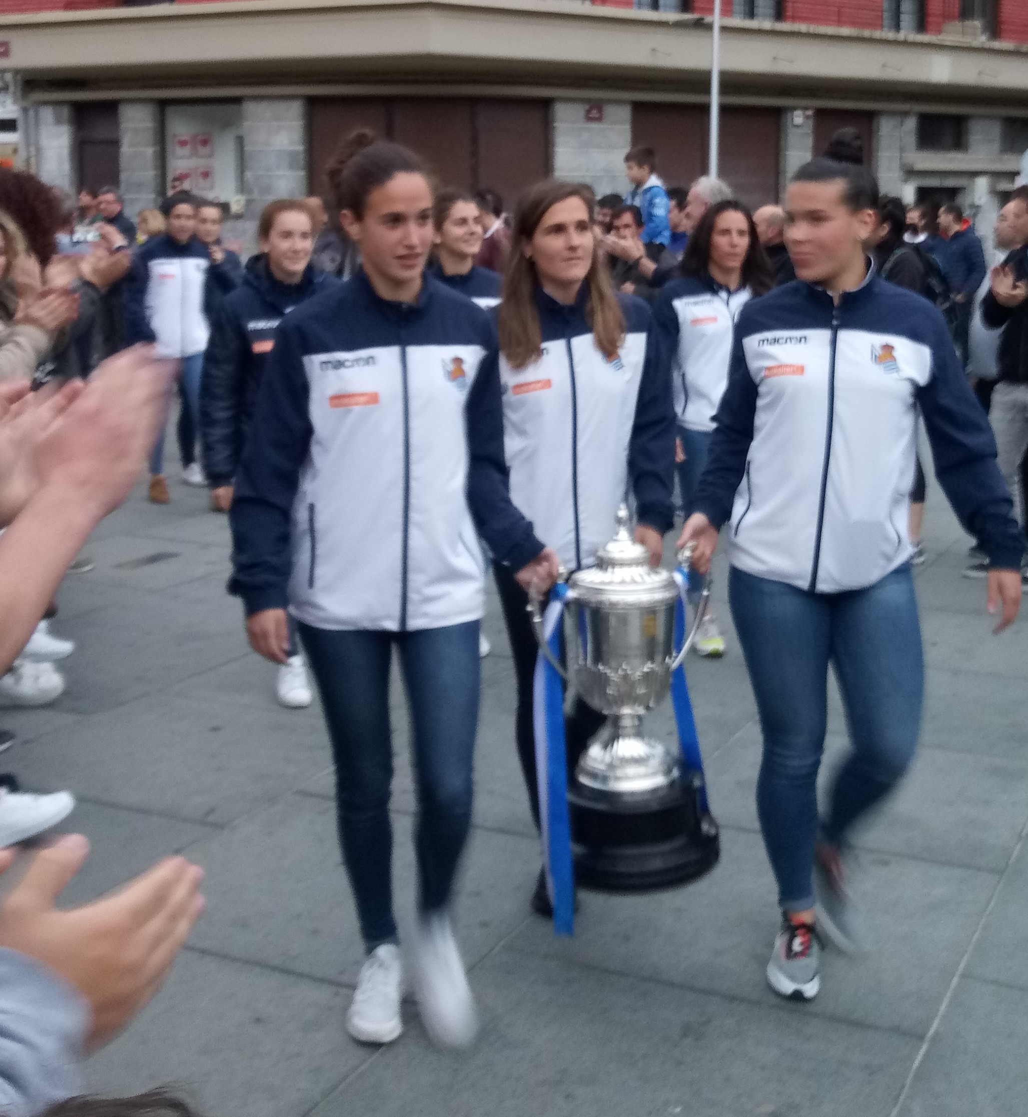 Foto de Olaizola, Ramajo y Baños a su llegada a Irún con la Copa de la Reina 16-05-2019